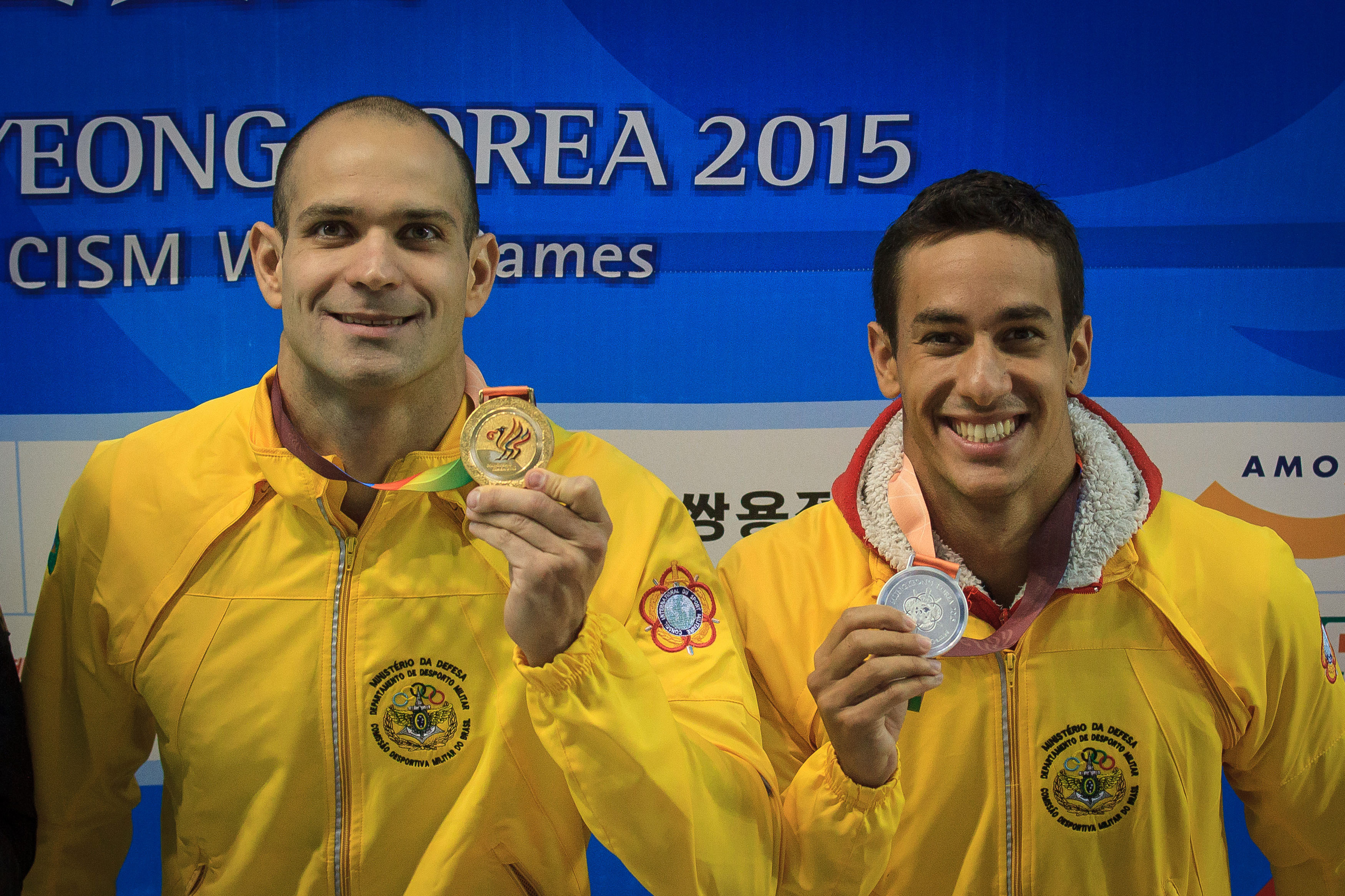 Ouro para Nicolas Araújo DIas dos Santos e Prata para Henrique de Souza Martins nos 50m borboleta da natação em Gimcheon pelos 6º Jogos Mundiais Militares. Foto: Sgt Johnson Barros